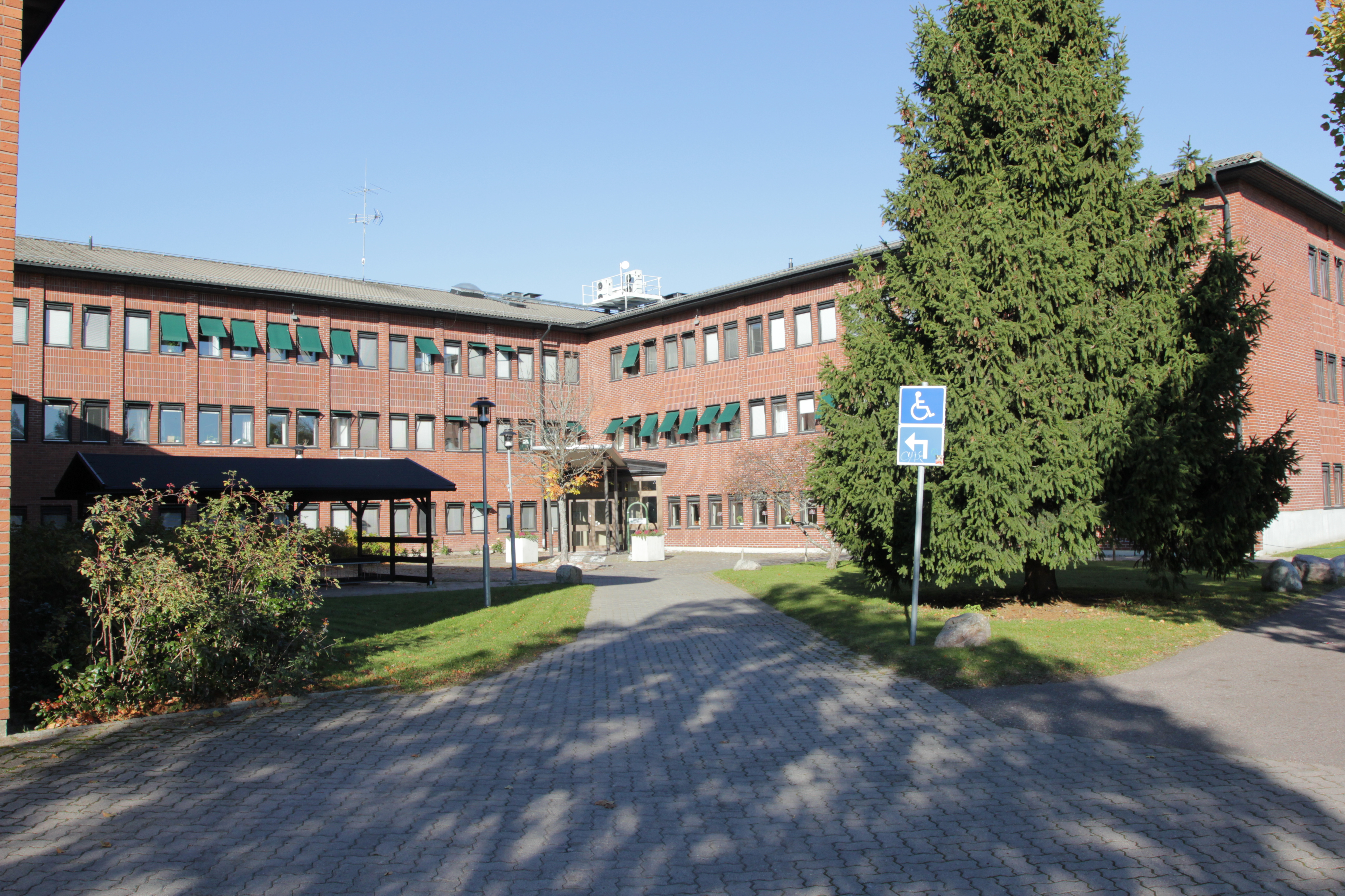 Tjädernhuset (Hedemora kommunhus), Hedemora, Sverige